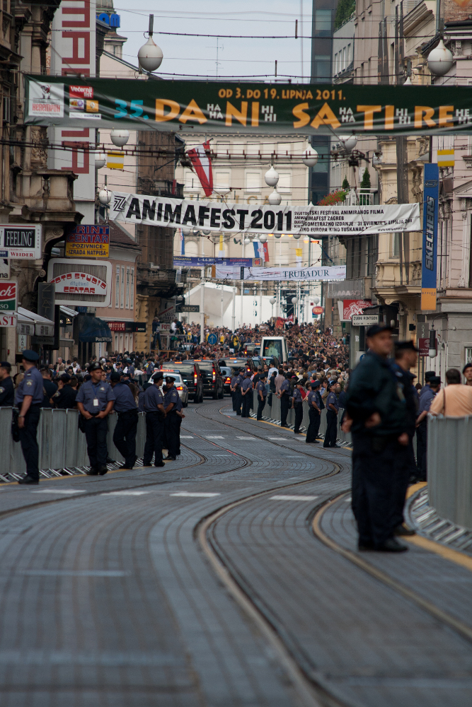 Papa Benedikt XVI. tijekom dvodnevnog apostolskog posjeta Hrvatskoj.